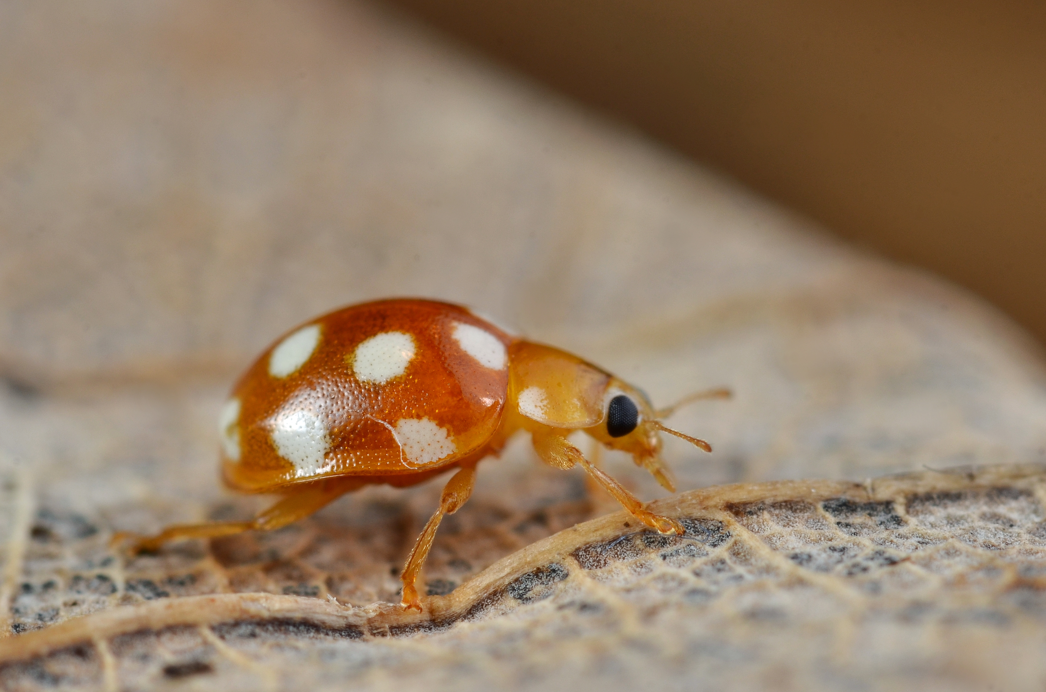 Vibidia duodecimguttata. Jambes, Belgium